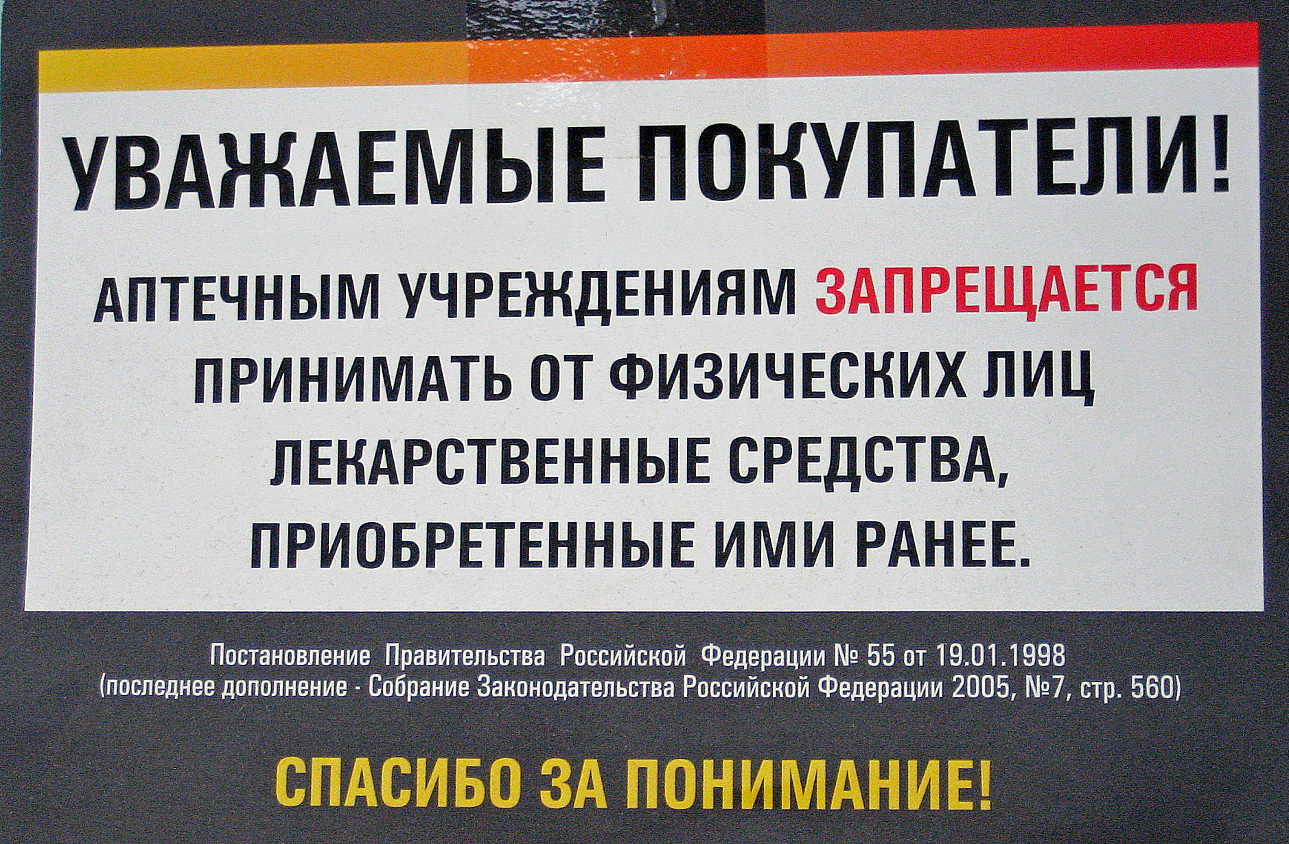 Предупреждение в аптеке.